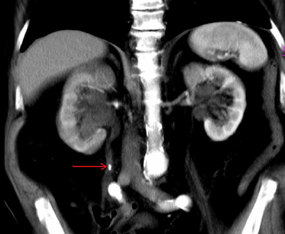 Stein im rechten Harnleiter, mit Aufstau des Nierenbeckens. Computertomografie mit Kontrastmittelgabe